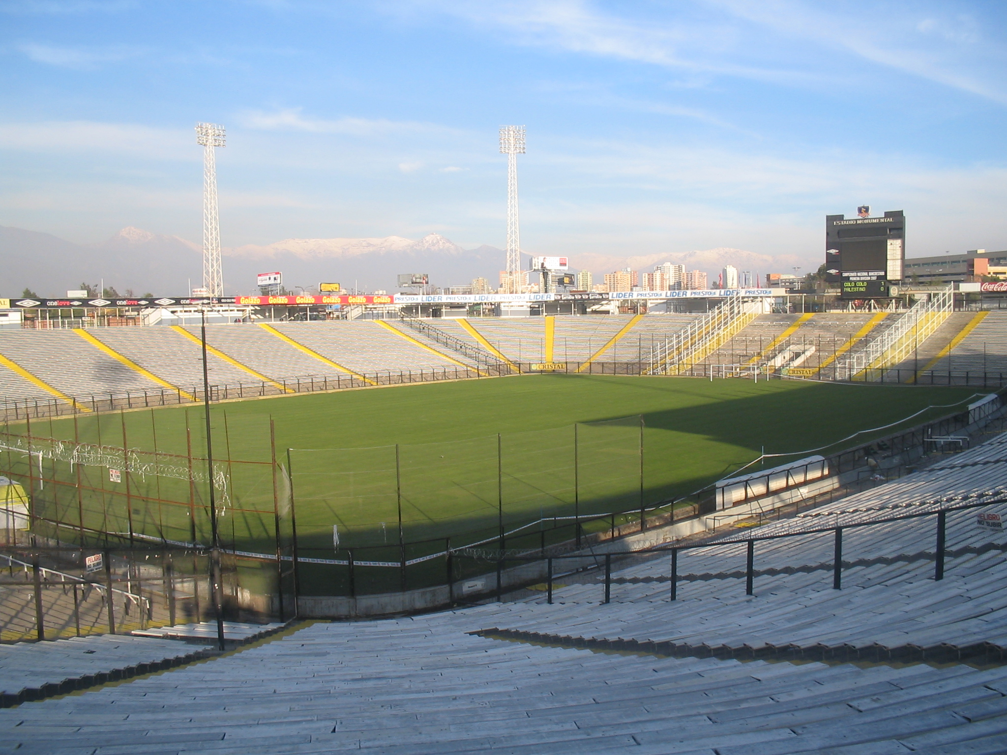 Estadio Monumental, Macul, Santiago de Chile